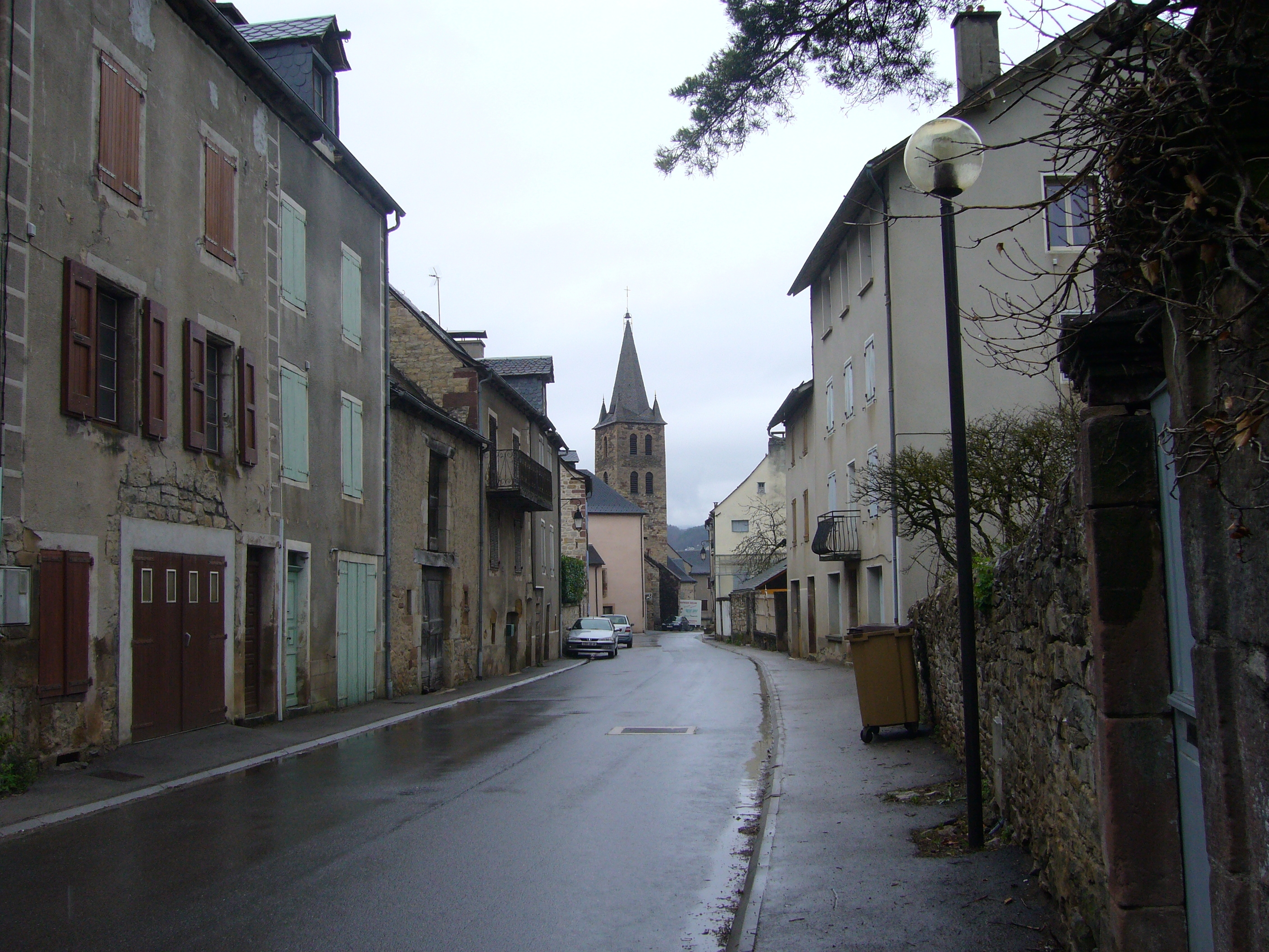 Une rue de Banassac (Lozère, France), et l'église au fond